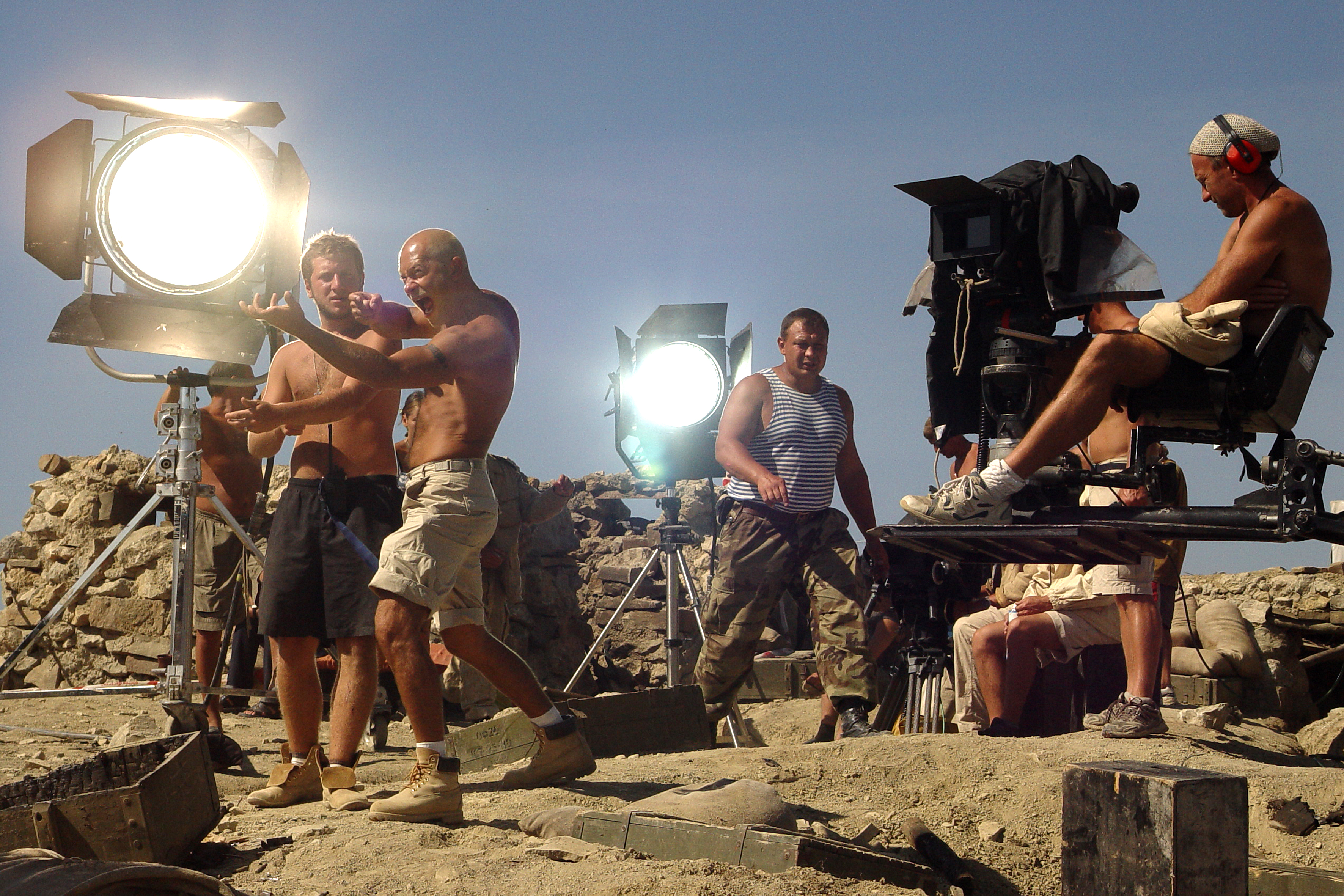 На съёмочной площадке фильма "9 рота"